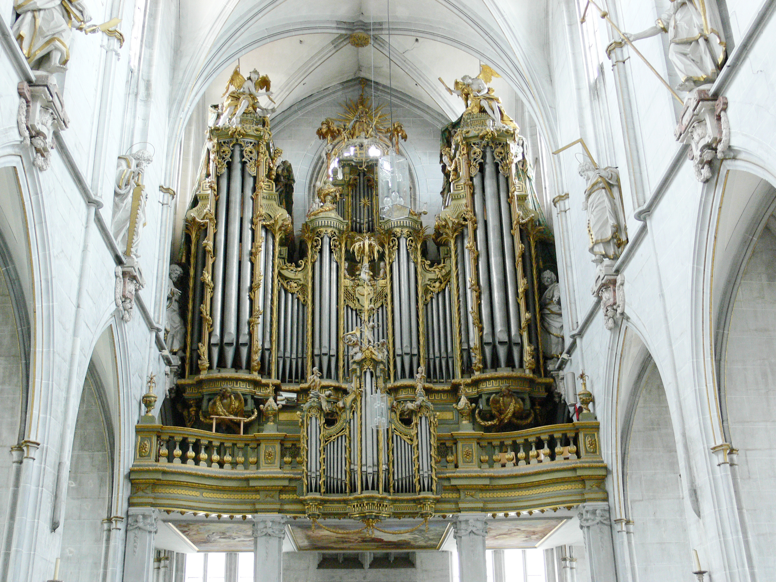 Description: Orgel (Schwarz-Orgel von 1900/1901 im Prospekt von Johann Georg Dirr von 1774–1784) Source: User:Saberhagen Location: Salemer Münster, Salem (Baden), Germany Source: own photograph by uploader